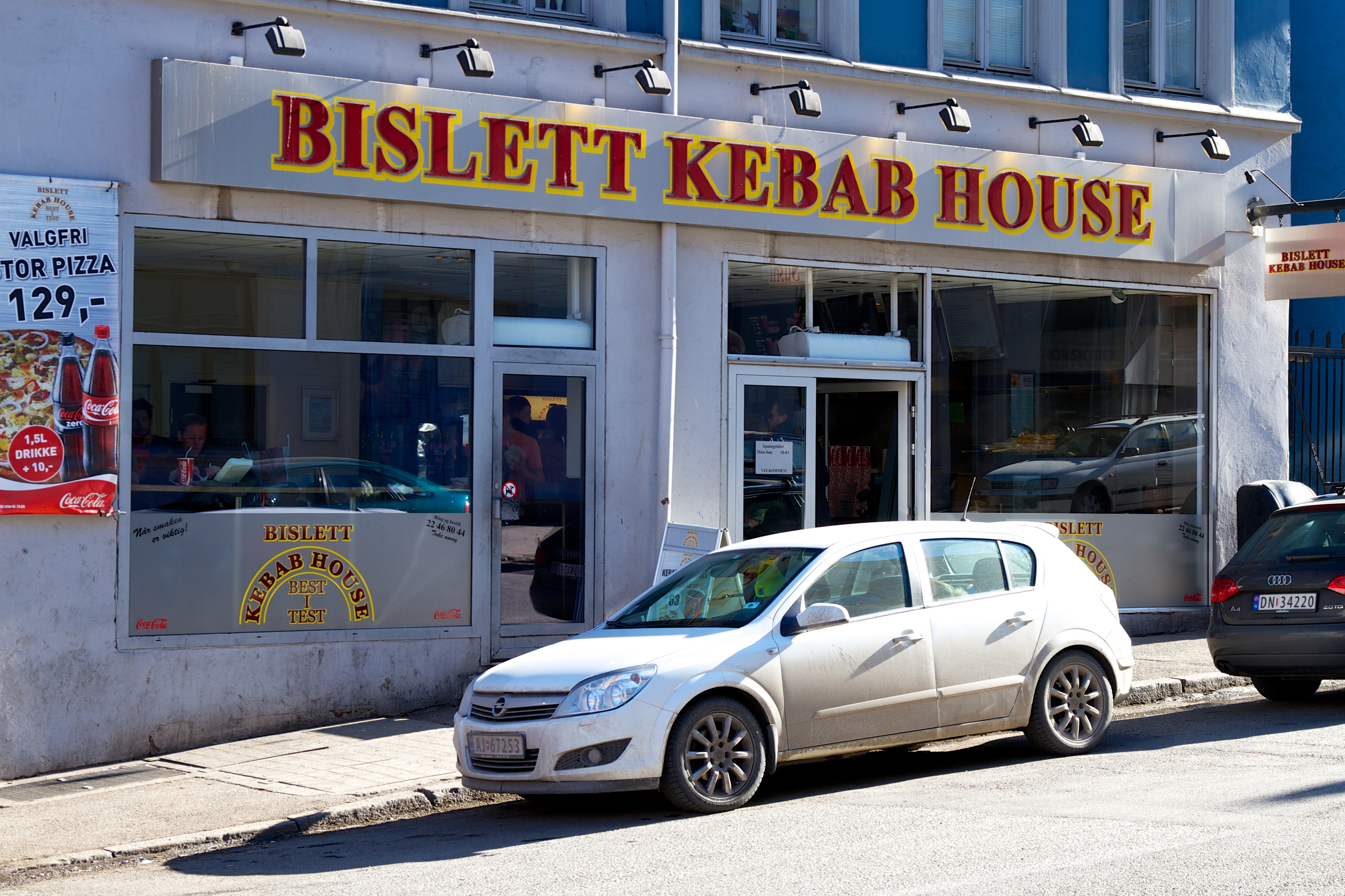 Bislett Kebab på Bislett i Oslo.